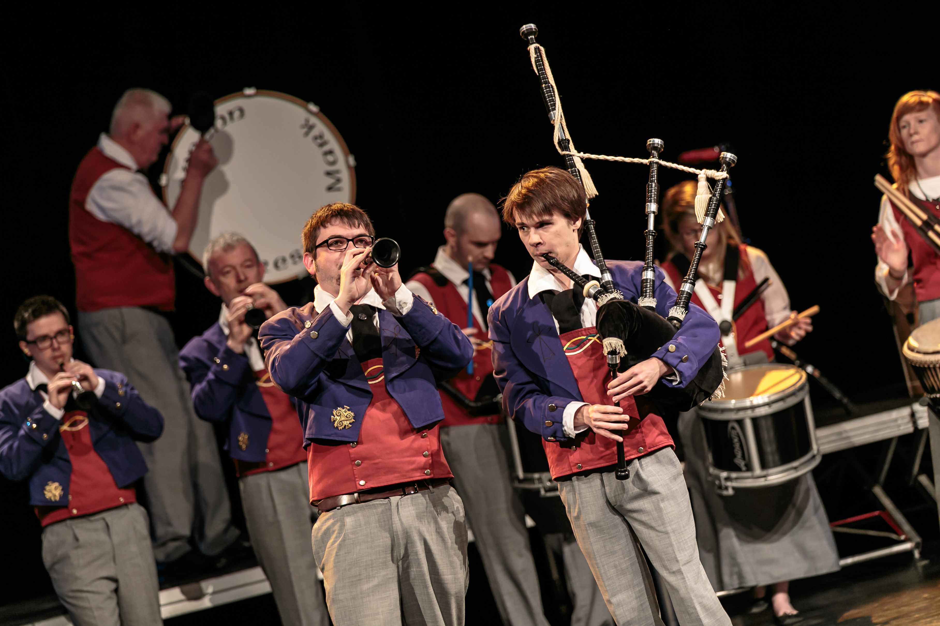 Prestation de la Kevrenn Brest Sant Mark pour les 21 ans du bagad Bro An Aberioù à Plabennec le 16 avril 2016.